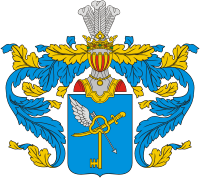 Герб рода Толстых: “ В щите, имеющем голубое поле, изображены золотая сабля и серебряная стрела, продетые остроконечиями крестообразно сквозь кольцо золотого ключа и над ключом с правой стороны видно серебряное крыло распростёртое. Щит увенчан обыкновенным дворянским шлемом с дворянской на нём короной и тремя страусовыми перьями. Намёт на щите голубой, подложен золотом. ” —Общий гербовник дворянских родов Российской империи, часть 2, стр. 42